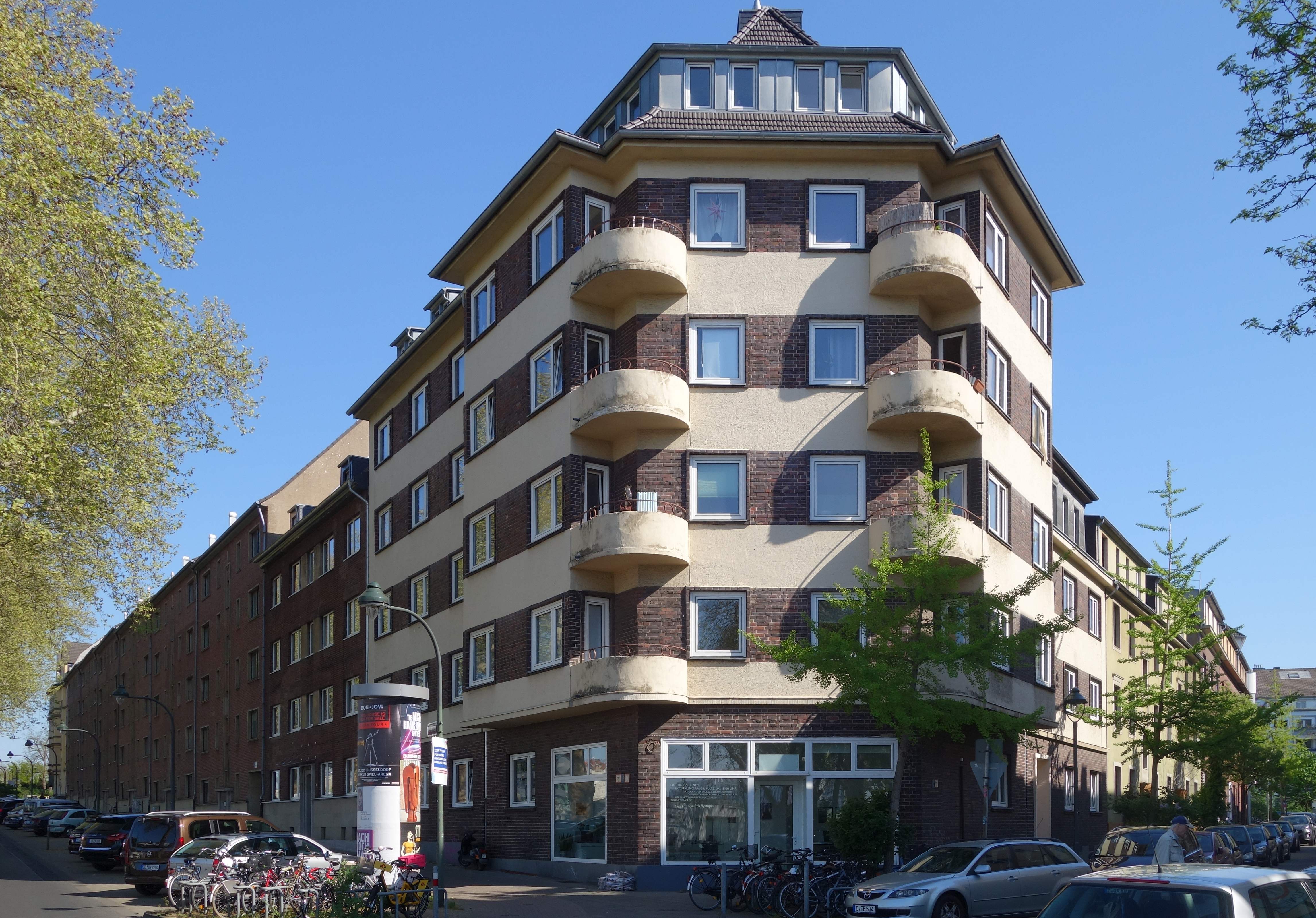 Düsselkämpchen 2, Düsseldorf, 2019. Düsselkämpchen 2, Düsseldorf, 2019 (4).jpg Düsselkämpchen 2, Düsseldorf, 2019 (4a).jpg Düsselkämpchen 2, Düsseldorf, 2019 (5).jpg